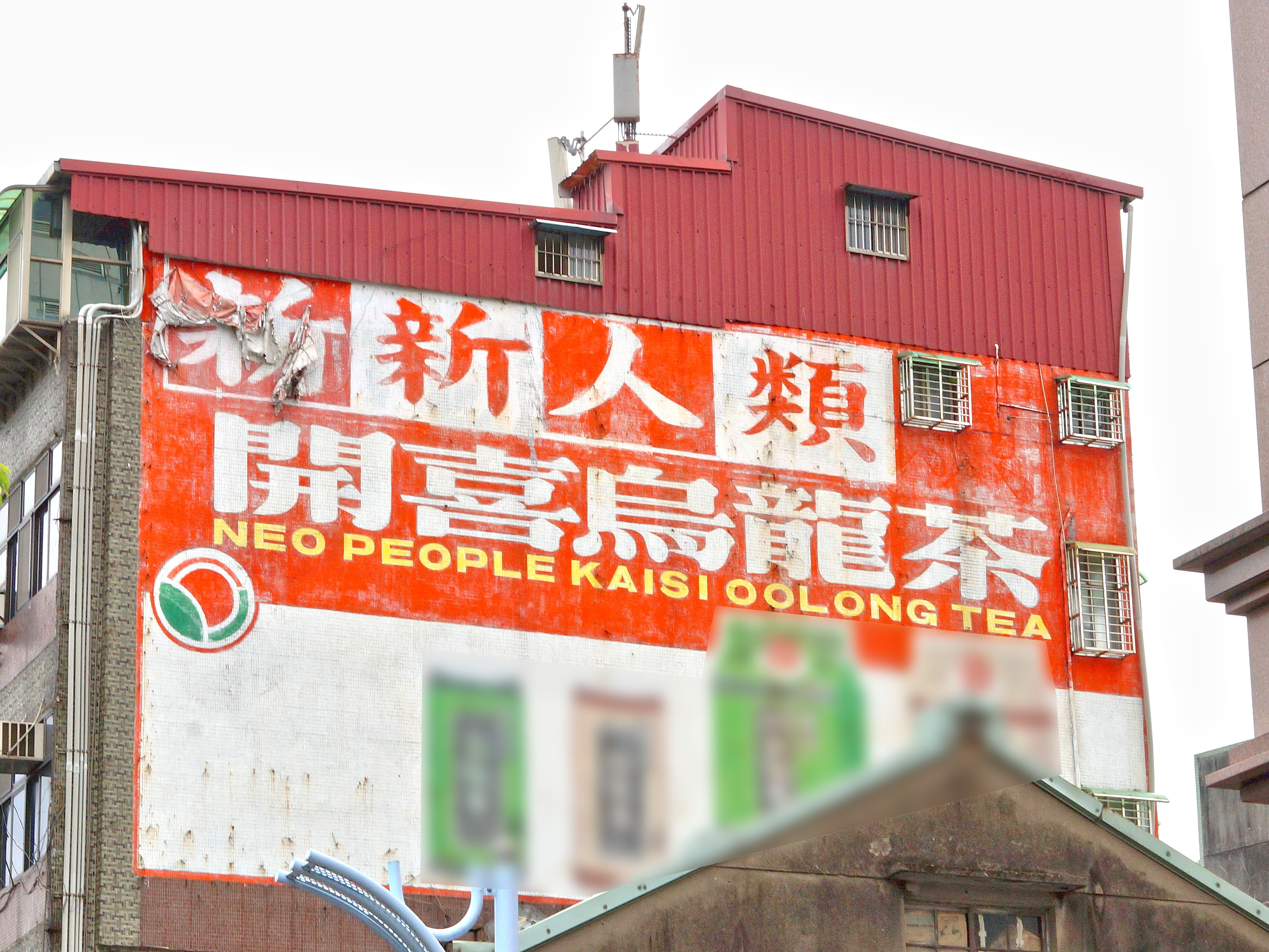 臺北市中山區中山北路一段，信喜實業「開喜烏龍茶」廣告壁畫，廣告詞：「新新人類，開喜烏龍茶。」